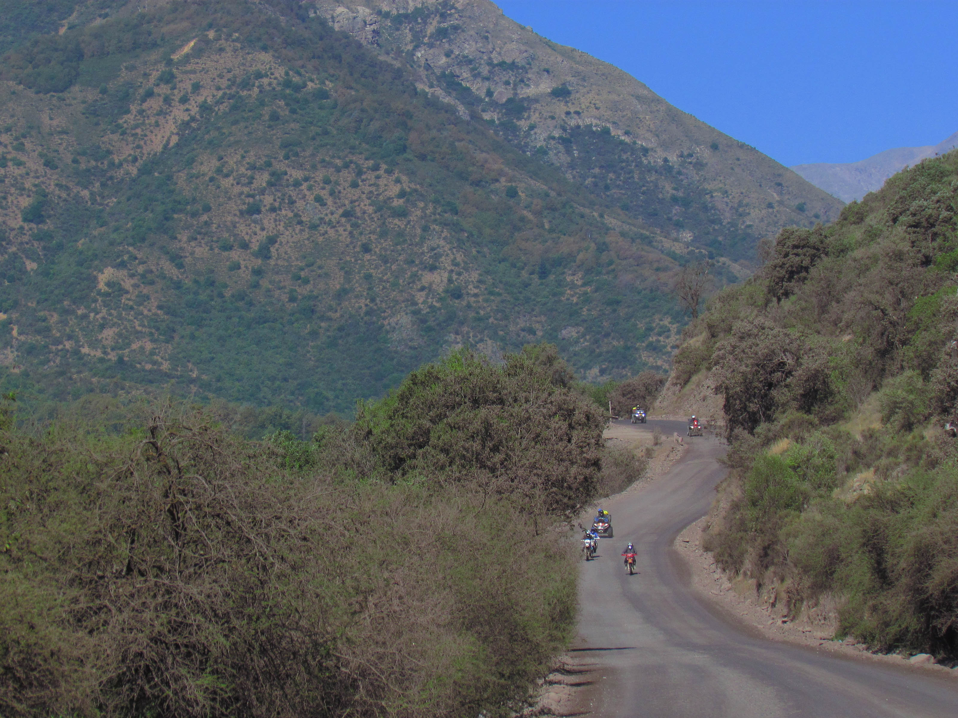 Los Queñes